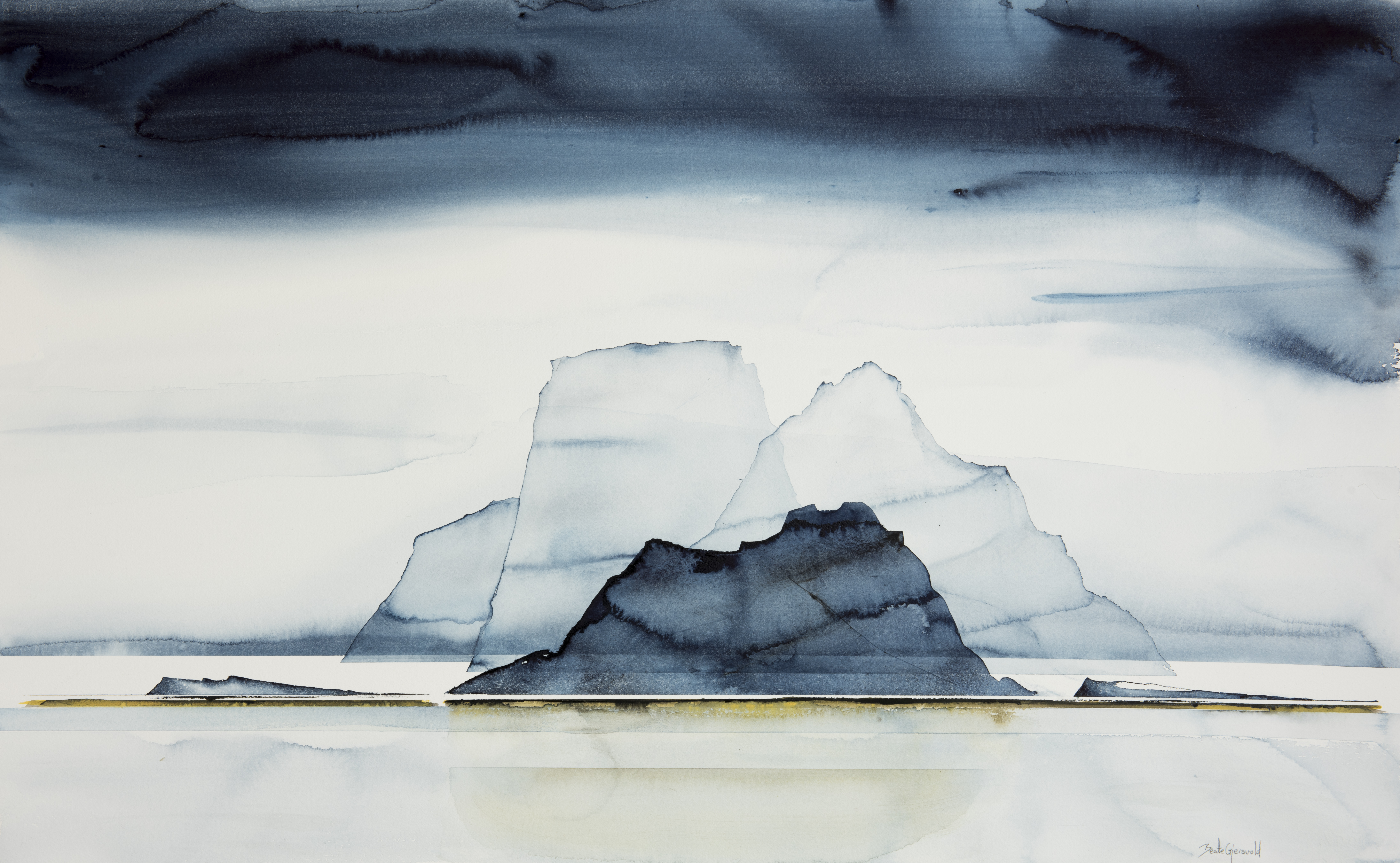 Akvarell av den norske kunstneren Beate Gjersvold. Tittel: «Blue Silence». 84x119 cm. 2017